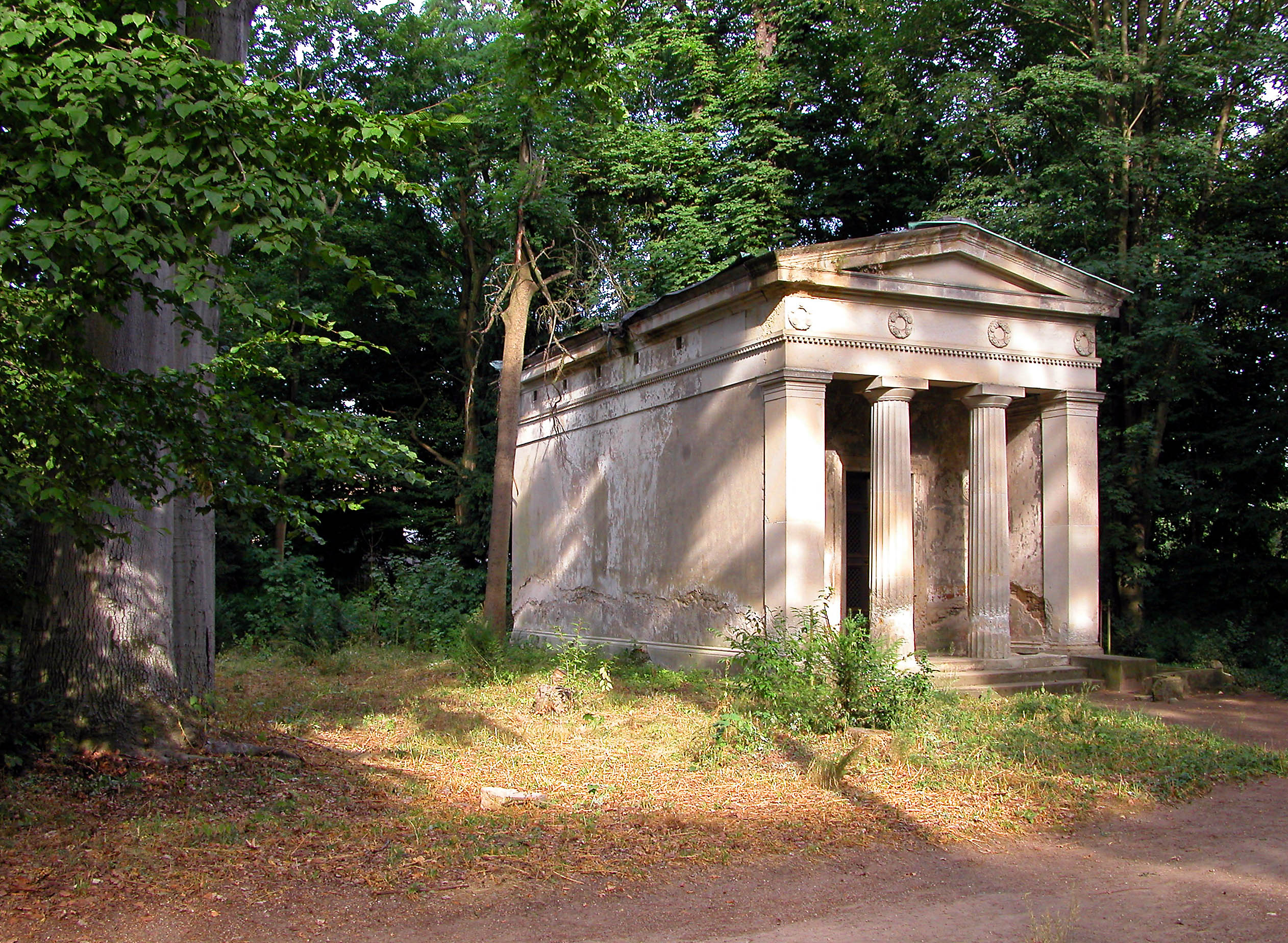 11.07.2003 04808 Nischwitz (Thallwitz), Dorfstraße 35 (GMP: 51.392264,12.705167): Schloß Nischwitz. Im Schloßpark befindet sich die um 1848 erbaute Gruft der Familie von Ritzenberg in Gestalt eines dorischen Antentempels (GMP: 51.391314,12.704449). [DSCN]20030711570DR.JPG(c)Blobelt